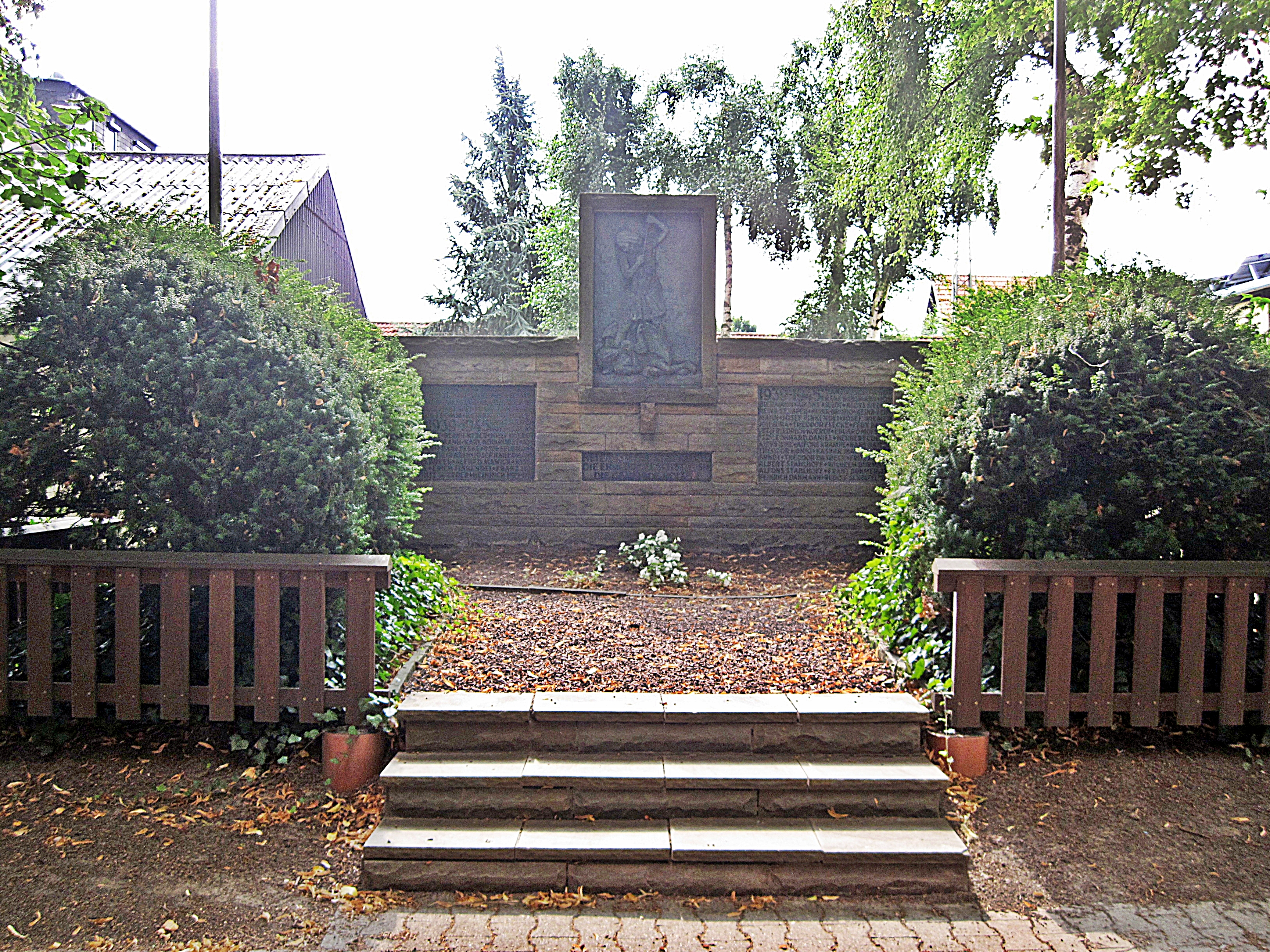 Werl-Holtum, Kriegerdenkmal an der Agathakirche